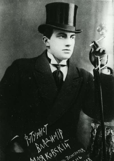 Vladimir Mayakovsky